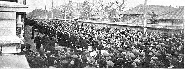 "L'effervescence populaire à Tokio: pendant la séance parlementaire du 5 février, la foule, contenue par la police, se porte vers les entrées latérales de la Chambre."